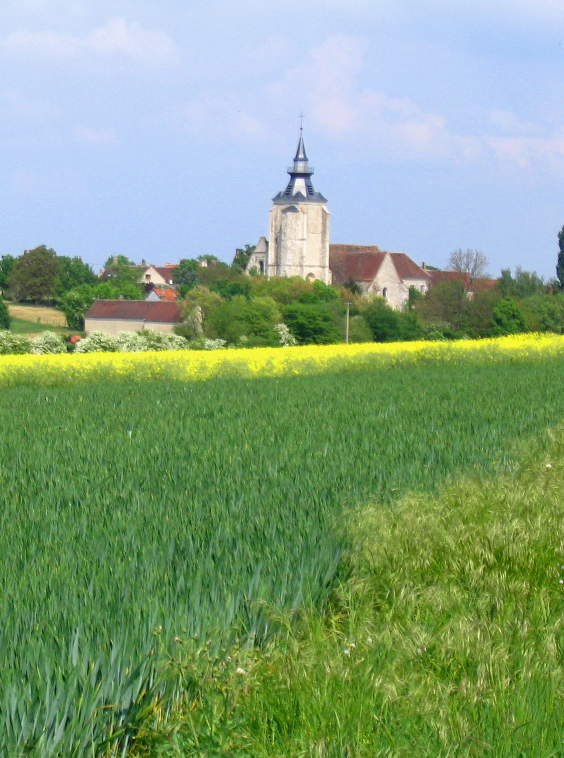 Eglise de Poilly-sur-Tholon - Yonne - France